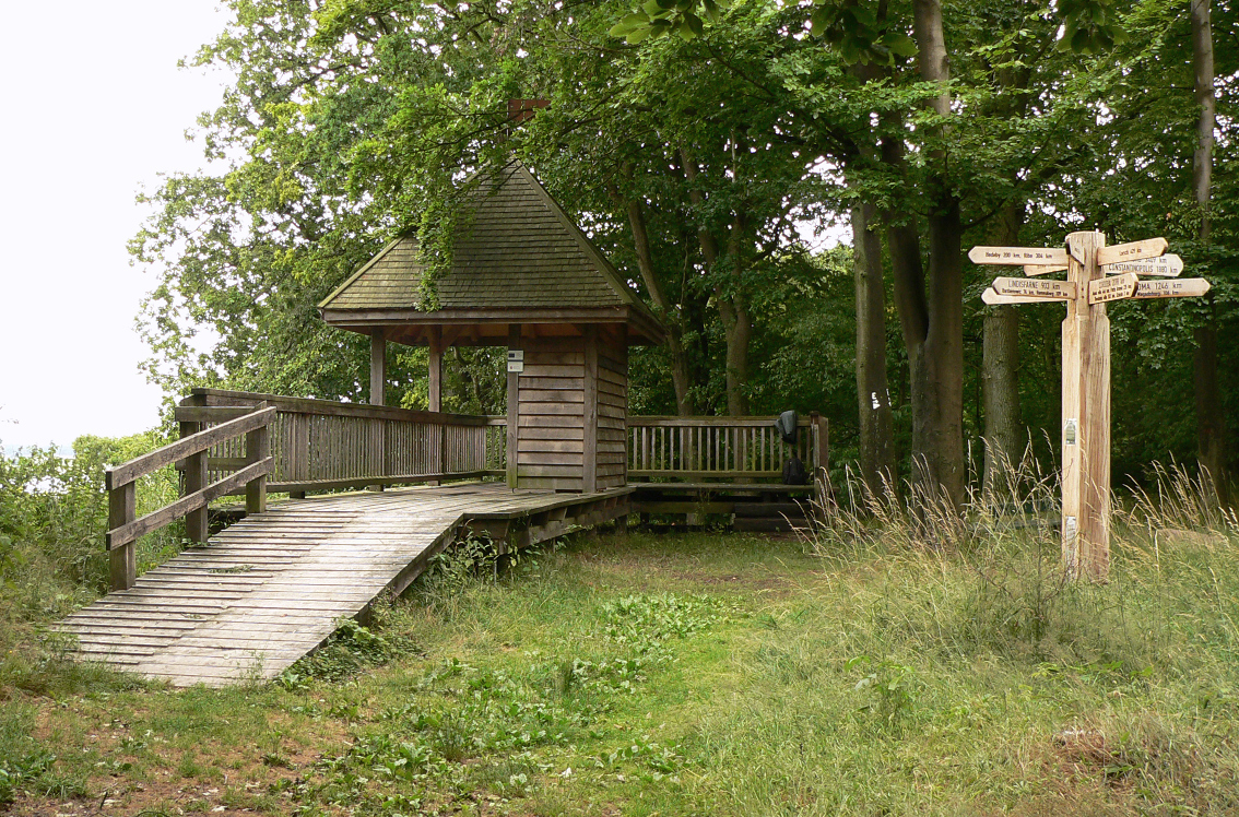 Elbseite mit Aussichtspunkt aus Holz, einem Turm nachempfunden